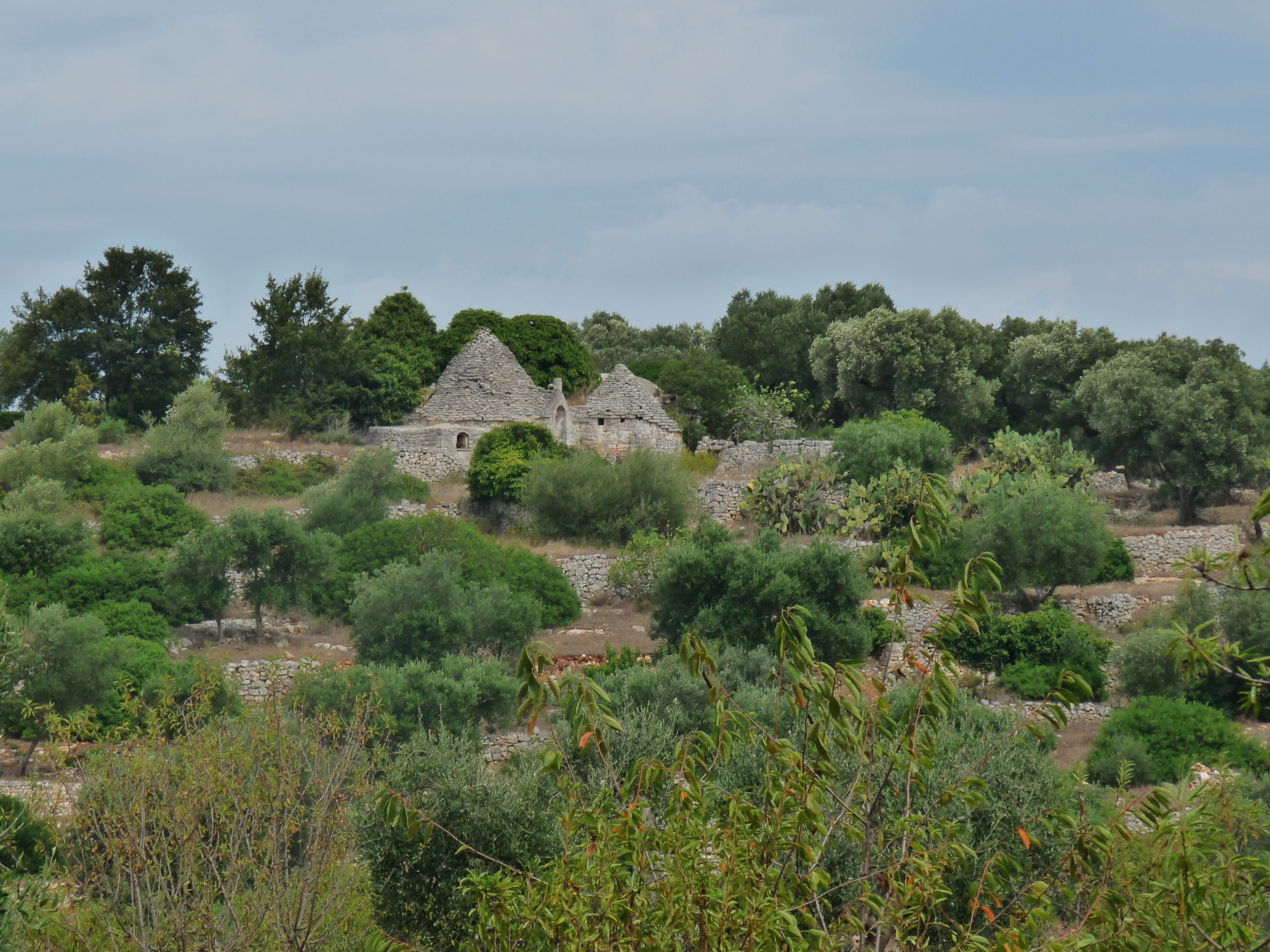 Uno dei tanti trulli della campagna cegliese posto in cima ad una collinetta che presenta i tipici terrazzamenti e i muretti a secco.